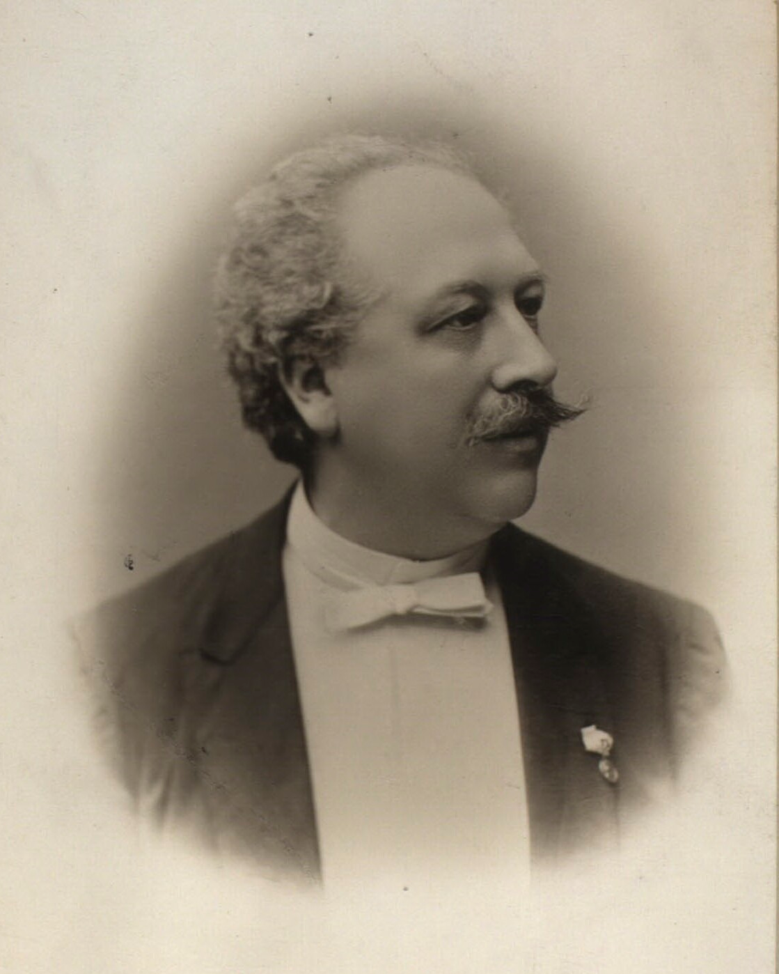 Komponisten og organisten Viggo Kalhauge 1840-1905 Danish Composer and organplayer Viggo Kalhauge